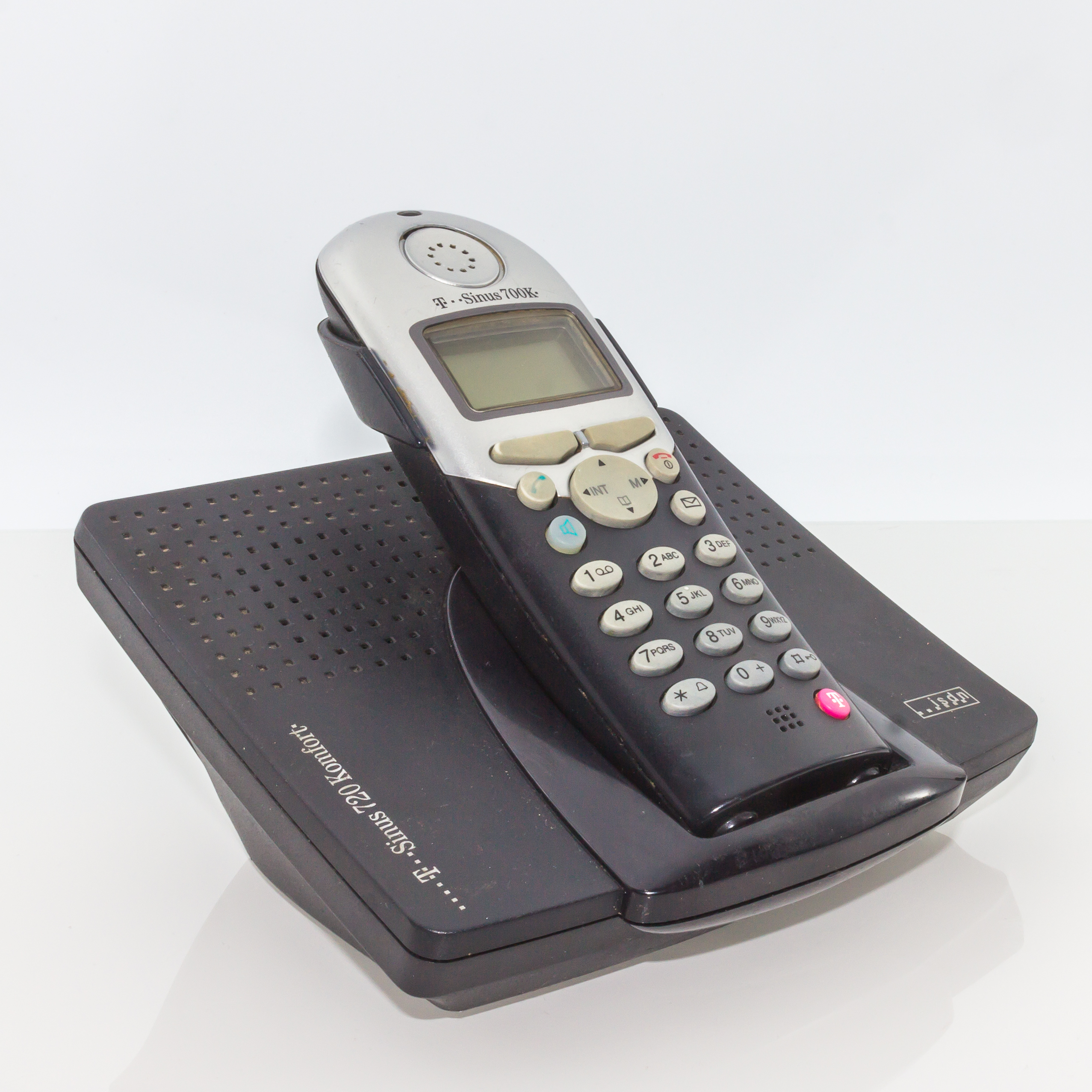 Schnurloses DECT-Telefon Sinus 720 Komfort für den Anschluss an ISDN der Deutschen Telekom